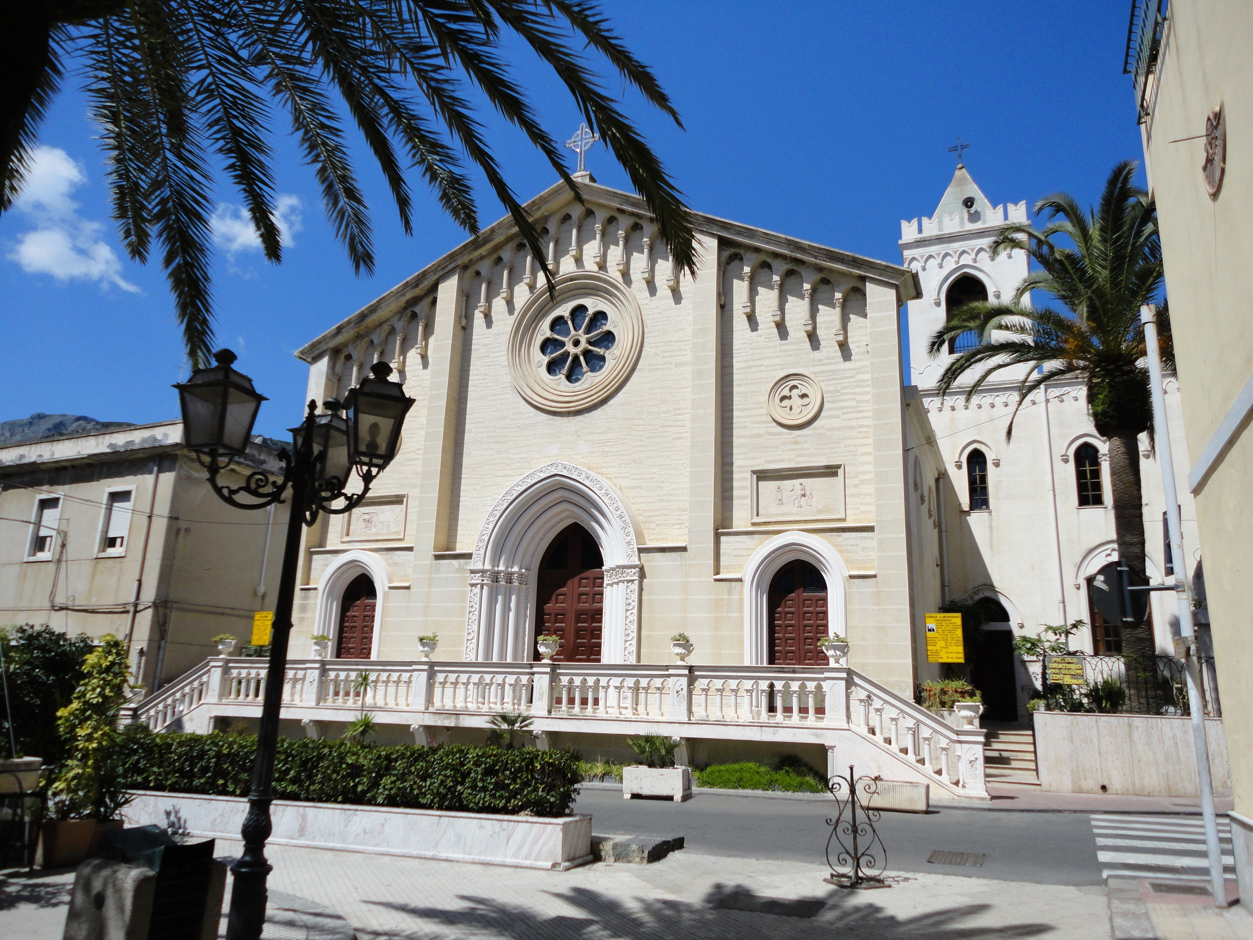 LETOJANNI - Chiesa S. Giuseppe